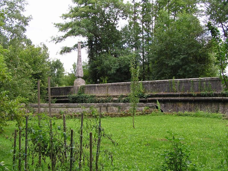 Pont de StSulpice